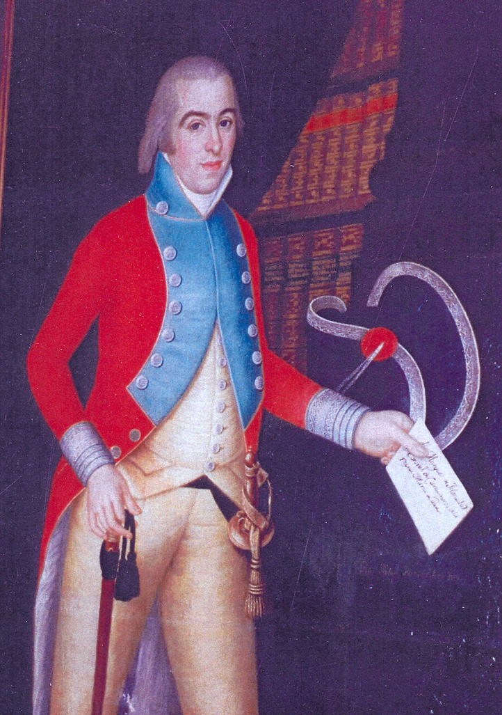 Retrato de Juan Nieto Aguilar, II Marqués de Monsalud (1769-1851)